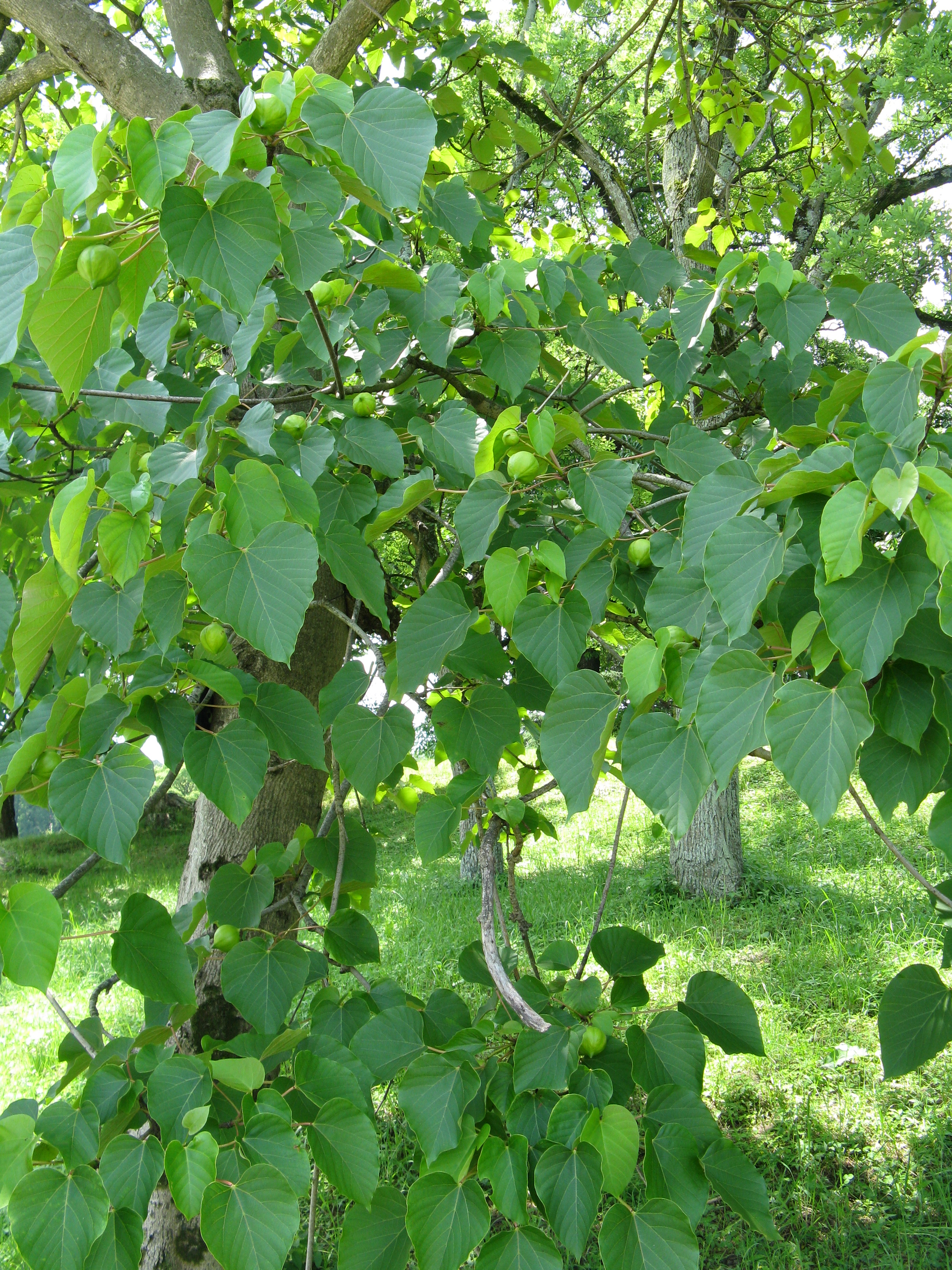 Scientific name Vernicia fordii